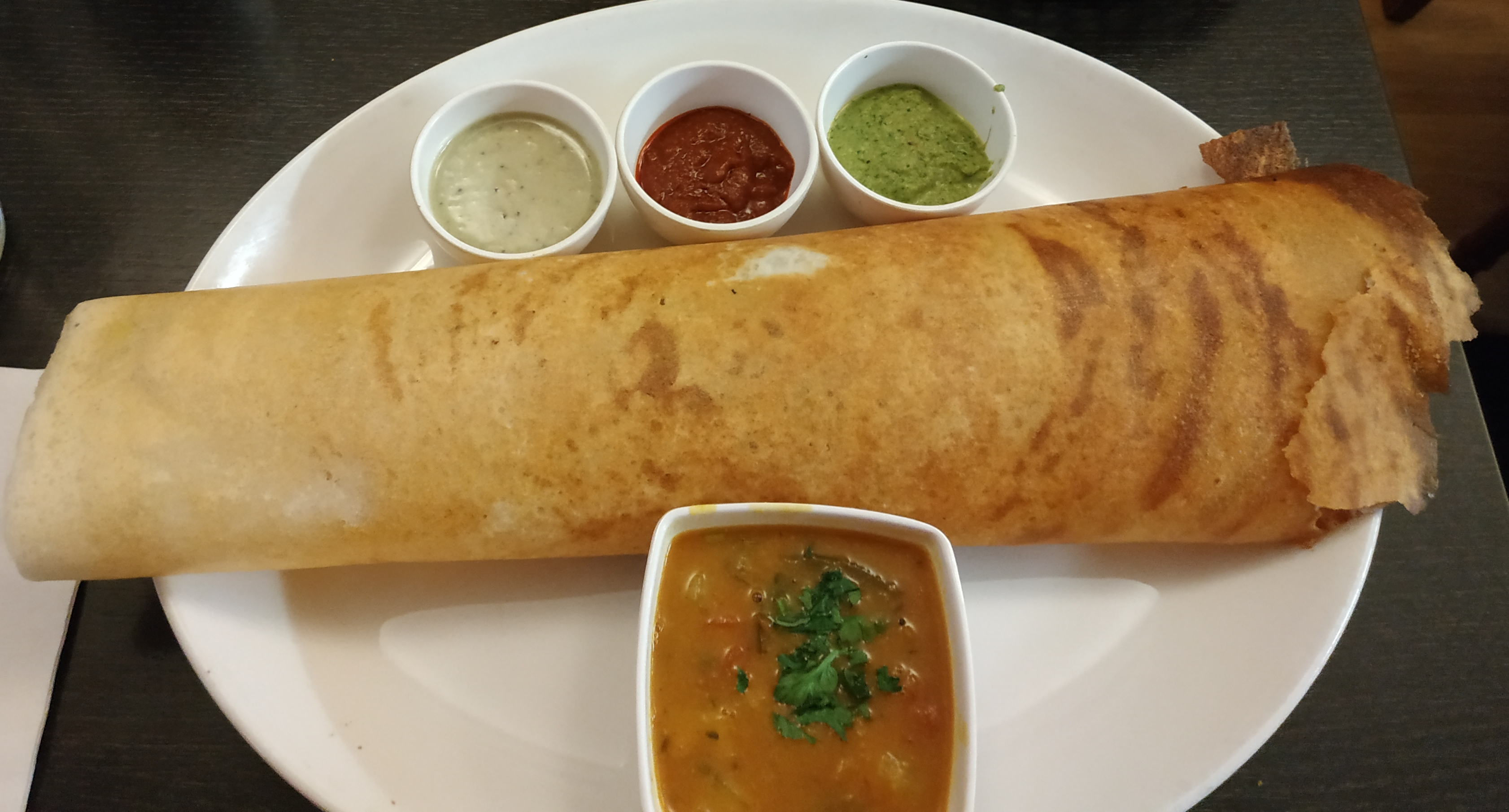 מסאלה דוסה